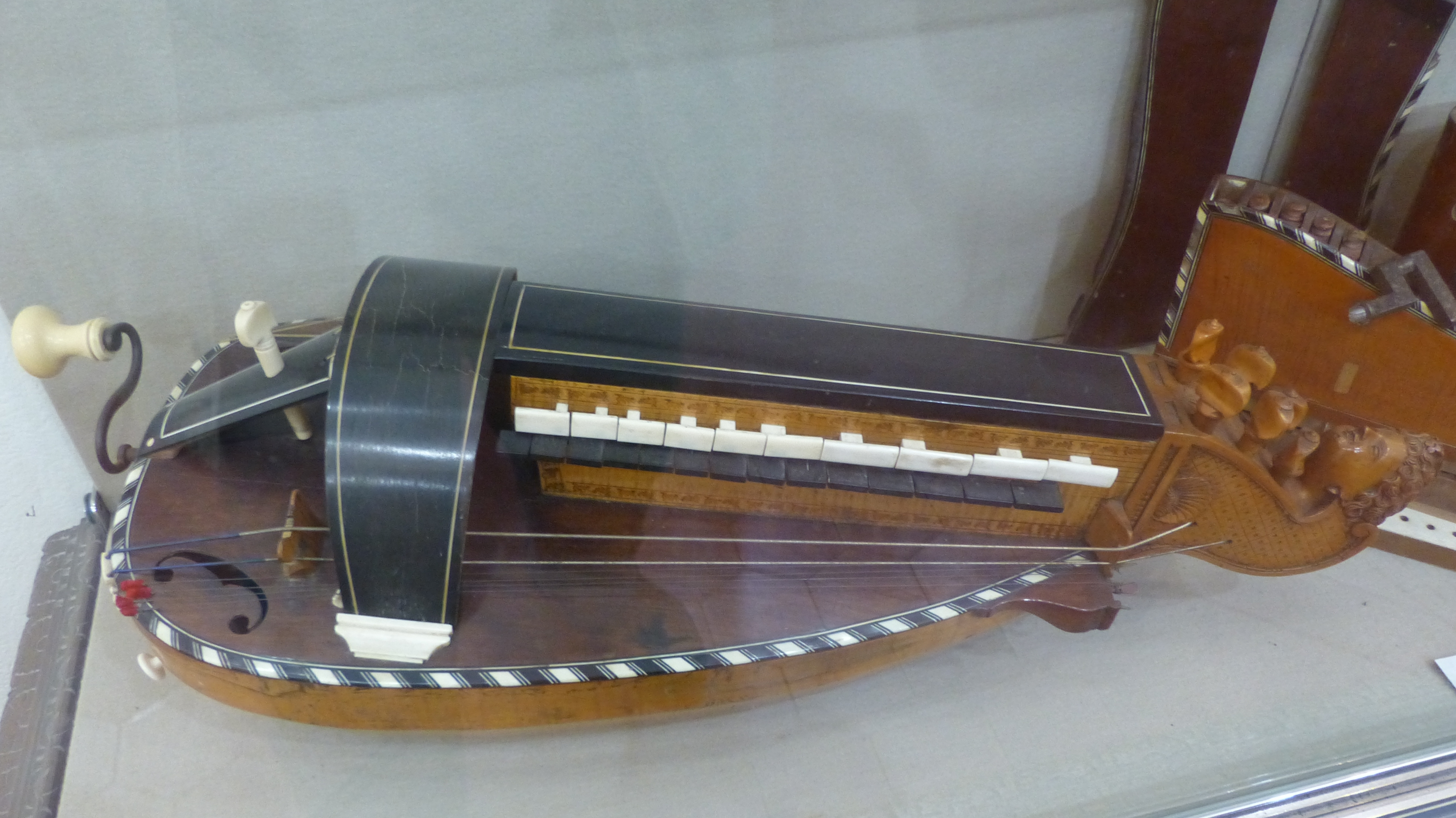 Nice (Alpes-Maritimes, France), au cœur du Vieux Nice, le palais Lascaris avec, entre autres, sa fabuleuse collection d'instruments de musique anciens, la deuxième de France.